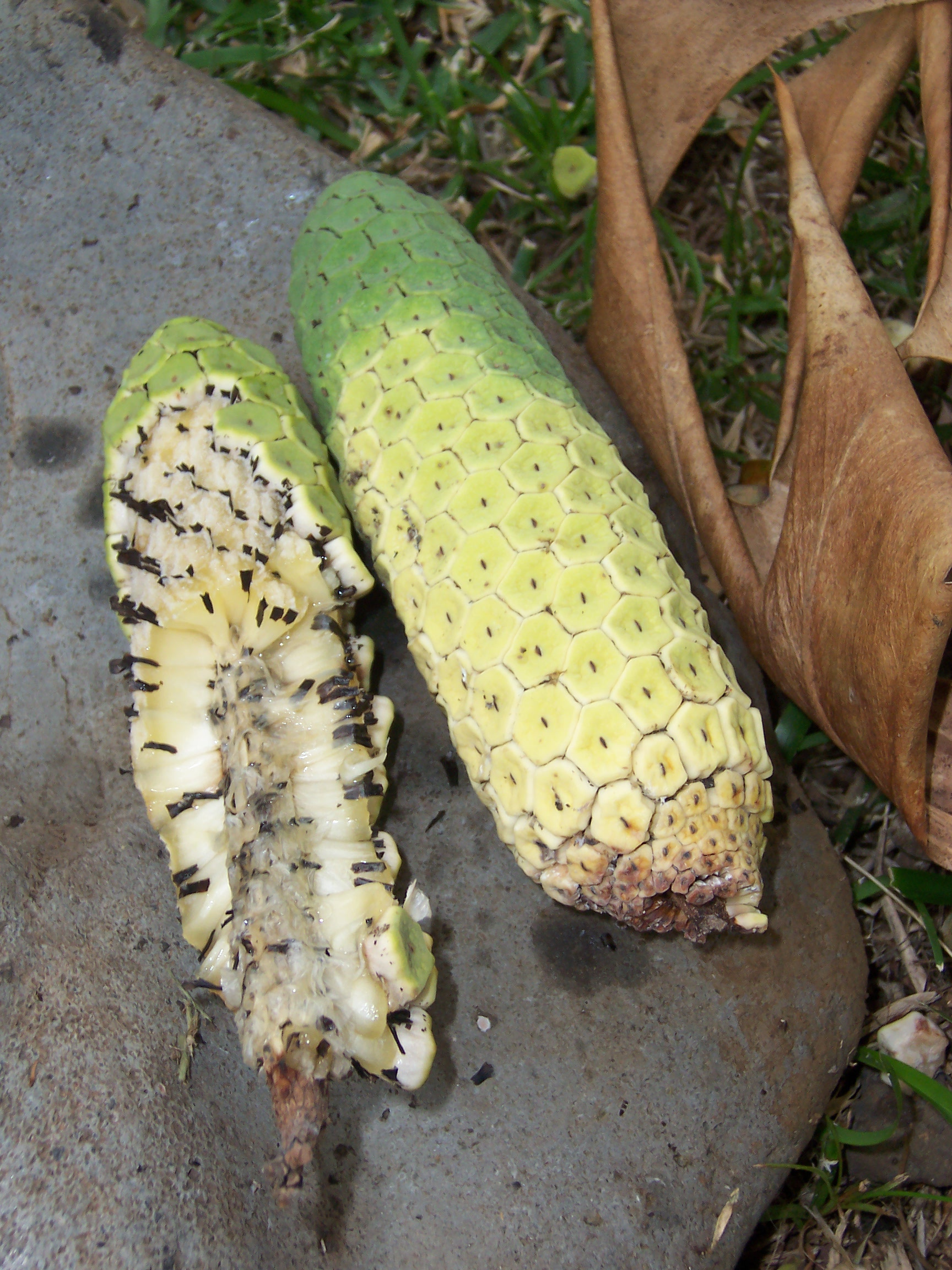 Monstera deliciosa : ripen fruits with inside details